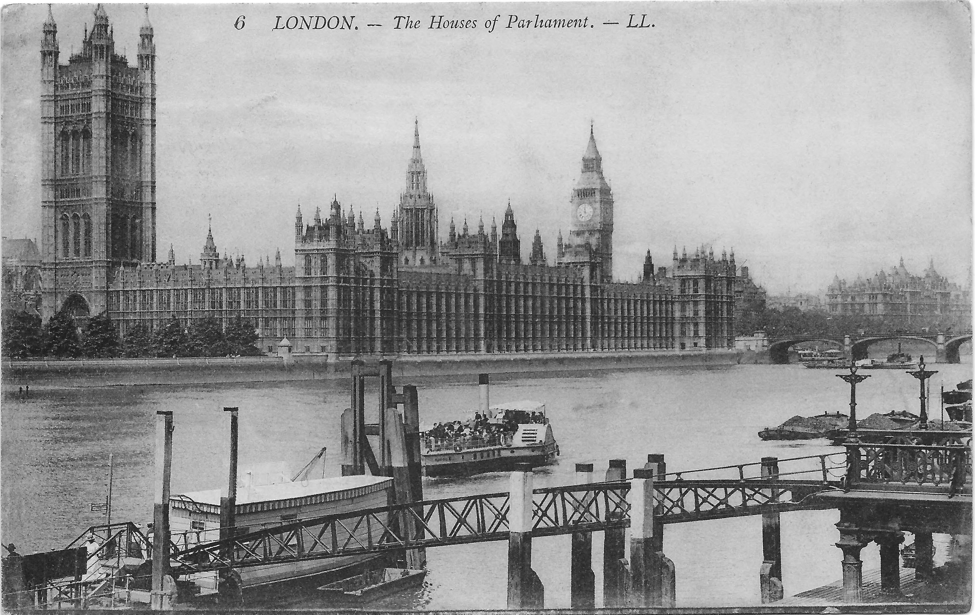 One LL postcard of the parlement posted in 1914